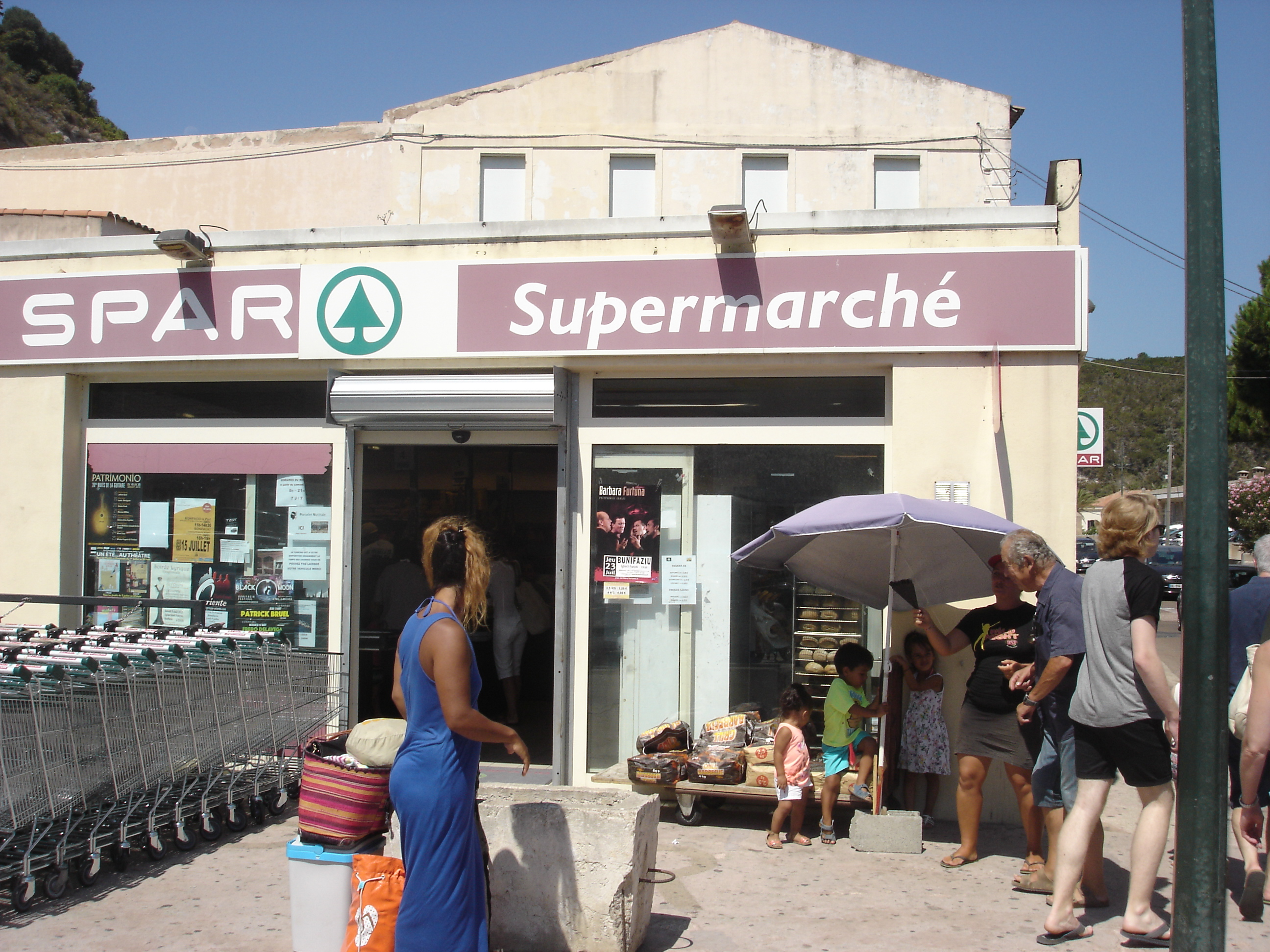 Spar supermarkt in Frankrijk Quel lieu ? Where?